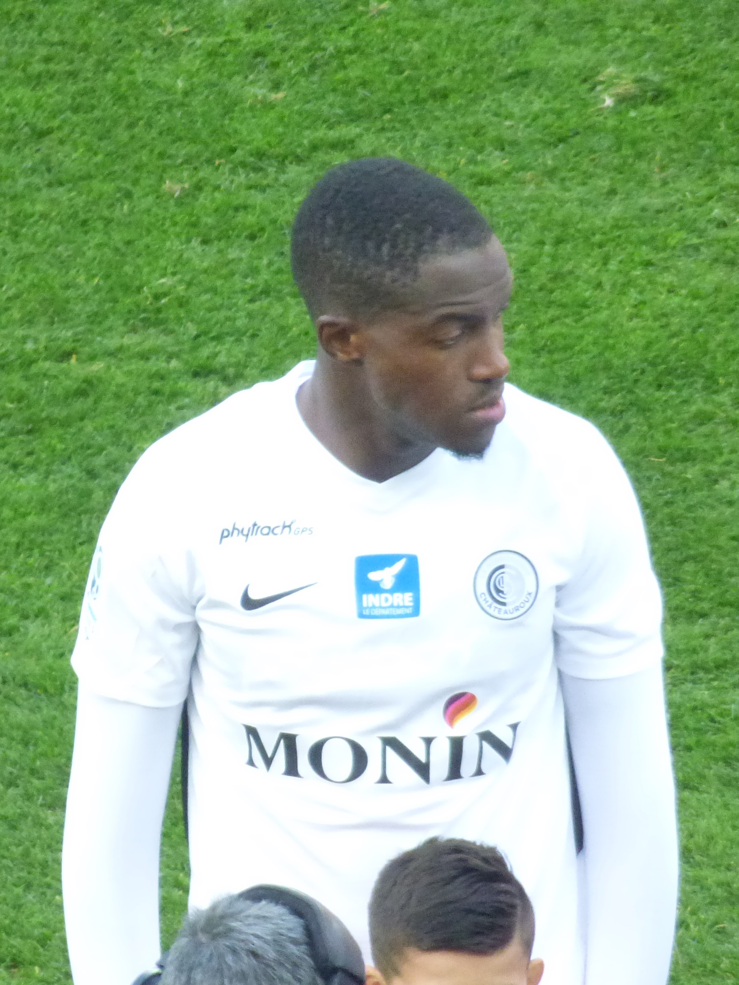 Oumare Tounkara avant le match RC Lens / LB Châteauroux, le 3 novembre 2018, comportant pour la treizième journée du championnat de France de football de Ligue 2, au Stade Bollaert-Delelis.